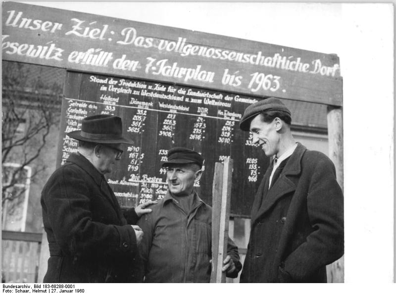 Jesewitz, Bauern vor der Leistungstafel der LPG Zentralbild Schaar 27.1.1960 Den Produktionsplan für 1960 zu überbieten und bis 1961 Westdeutschland in allen Positionen der Milchwirtschaft zu übertreffen, beschlossen die Bauern der Gemeinde Jesewitz im vollgenossenschaftlichen Kreis Eilenburg, bei denen vor wenigen Tagen der Erste Sekretär des ZK der SED, Walter Ulbricht, weilte. Zur Sicherung einer guten Futtergrundlage werden in Jesewitz in diesem Jahr 15 Prozent der Ackerfläche mit Mais und 34 Prozent mit Zwischenfrüchten bestellt. Hier einige Beispiele aus dem Kampfziel der Gemeinde Jesewitz: Plan 1960 Rinder je 100 ha-77, Kühe je 100 ha-38, Milch kg je Kuh-3200, Schweine je 100 ha-148; Ziel 1960: Rinder 85, Kühe 40, Milch 3350, Schweine 155; Westdeutschland Rinder 85, Kühe 39, Milch 3408, Schweine 153; Dänemark Rinder 104, Kühe 45, Milch 3625, Schweine 173. UBz: Sie diskutieren über den Aufruf des Nationalrates zum Wettbewert um das schönste sozialistische Dorf. (vlnr) Bürgermeister Bernhard Nied, Genossenschaftsbauer Karl Koß und der Vorsitzende der Nationalen Front Jesewitz, Schulleiter Hückl (im Hintergrund die Tafel mit den Produktionszahlen der LPG).